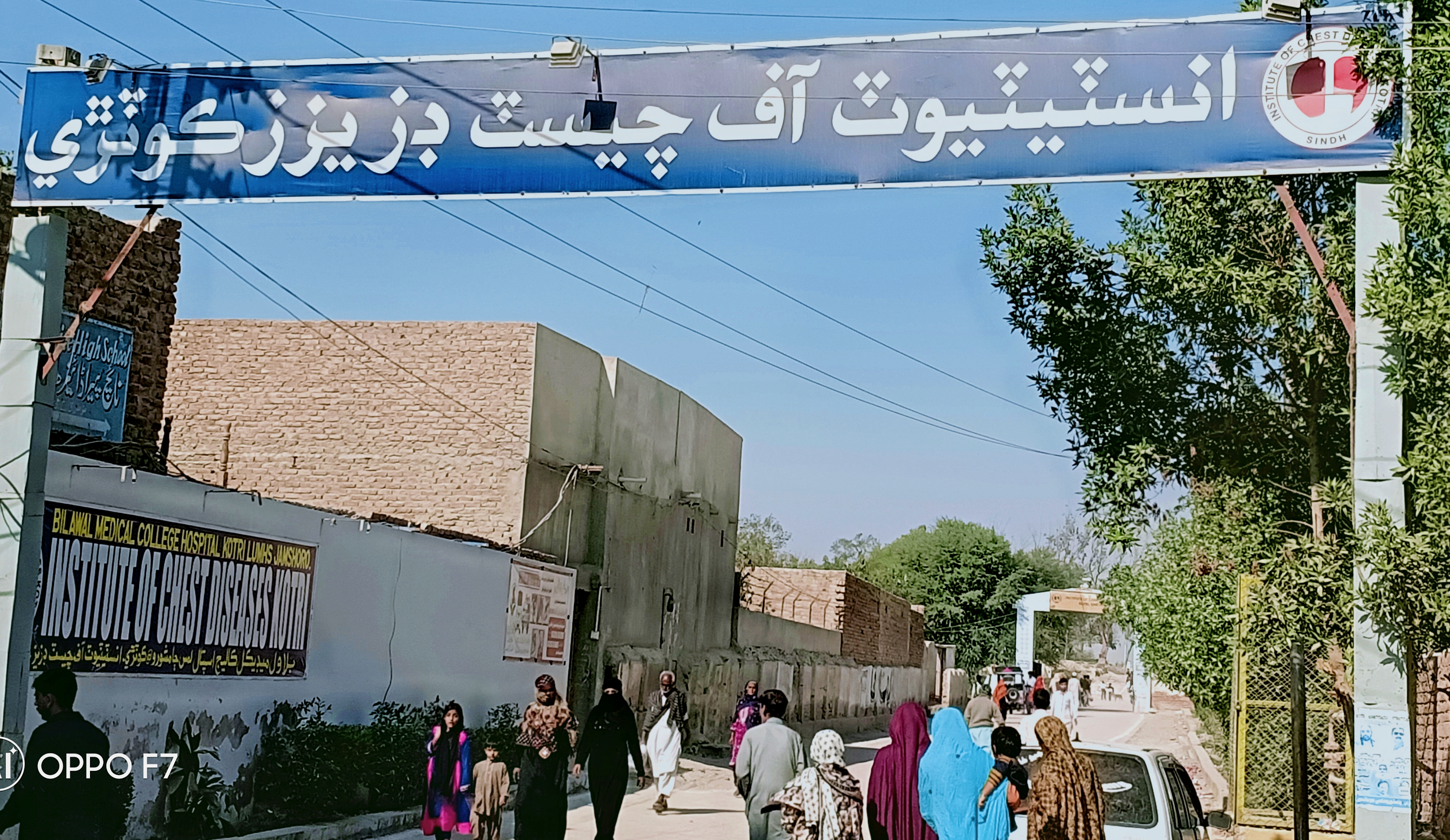 سنڌي: انسٽيٽيوٽ آف چيسٽ ڊزيزز ڪوٽڙي